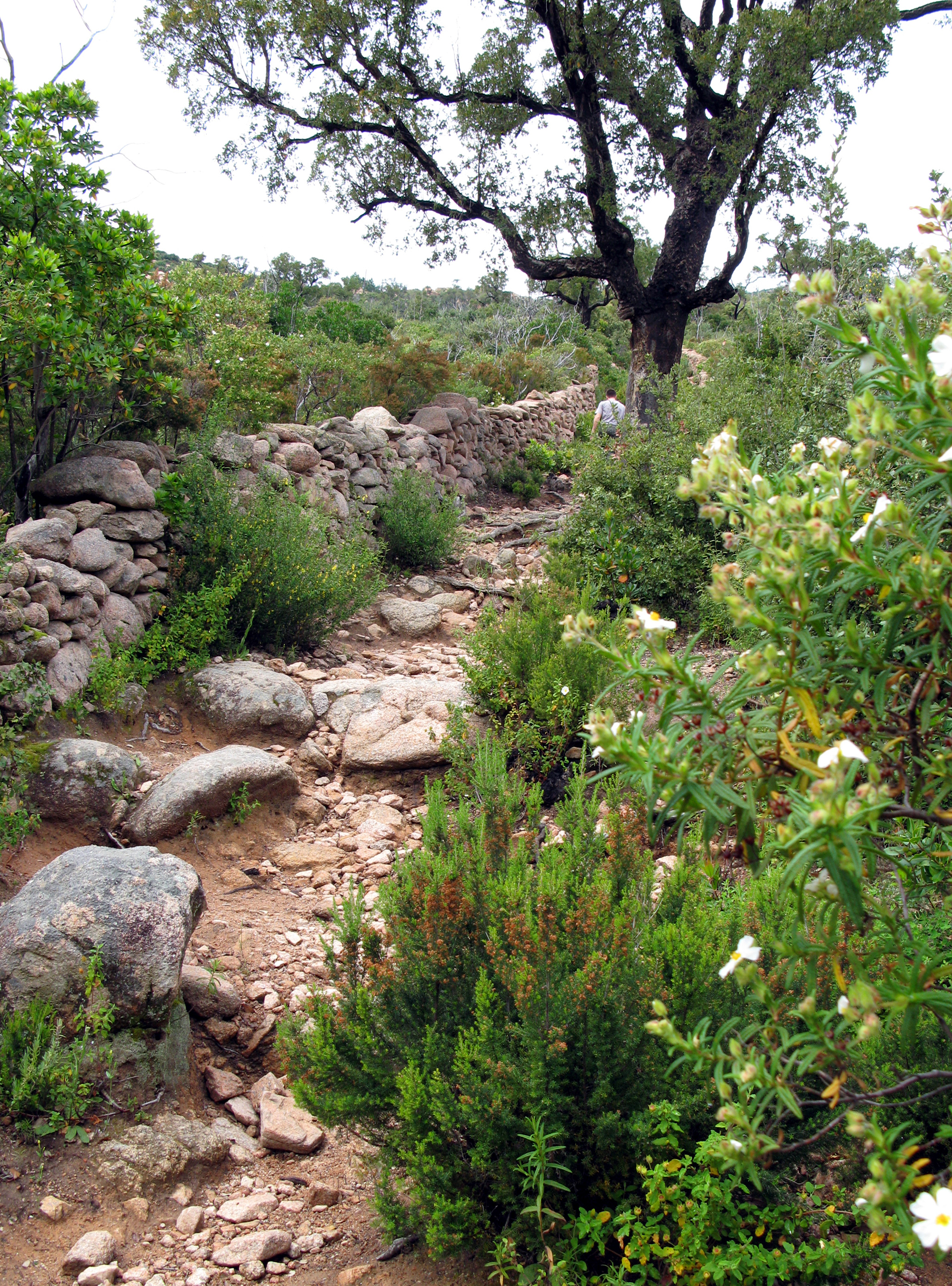 Araghju (Corse-du-Sud, France) - Début du sentier montant au "castellu" préhistorique.